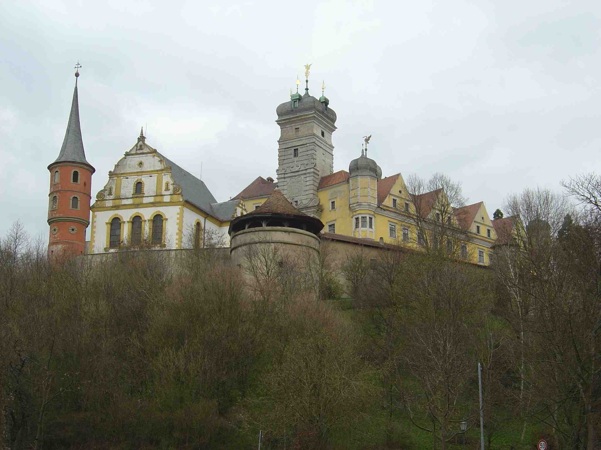 Beschreibung: Schloss Schwarzenberg Franken #1, Scheinfeld, April 2005 Quelle: selbst fotografiert, digital Lizenz: das Bild stelle ich als Public Domain gemeinfrei zur Verfügung